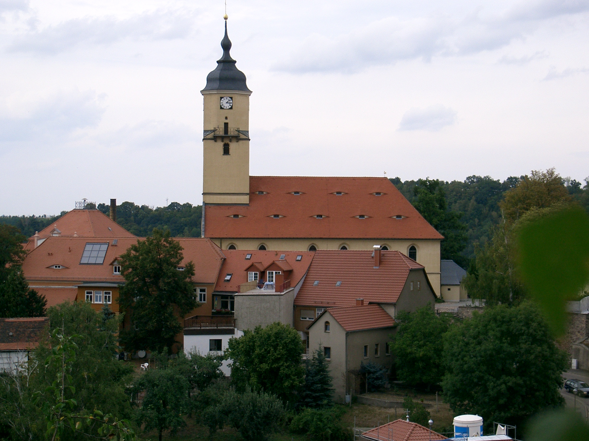 Blick zur Nossener Kirche